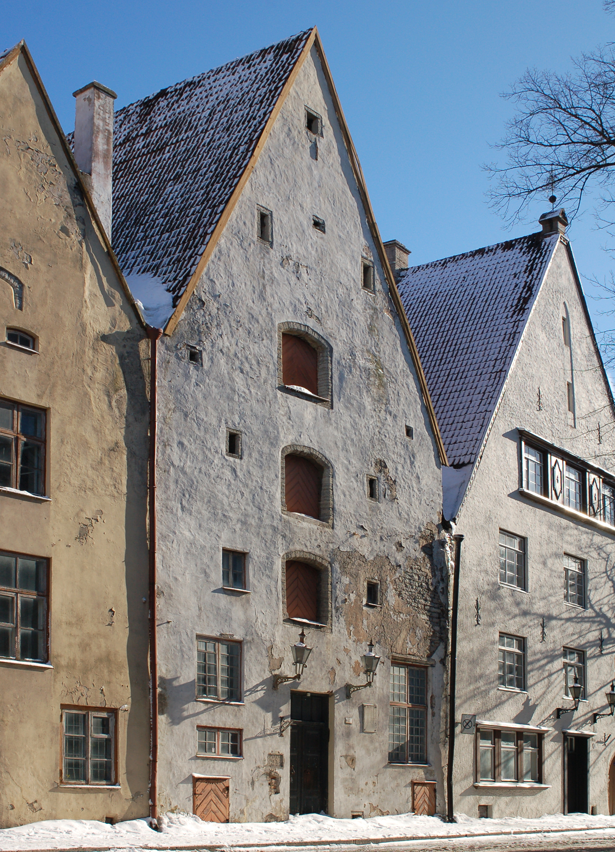 Elamu Tallinna vanalinnas Lai 40